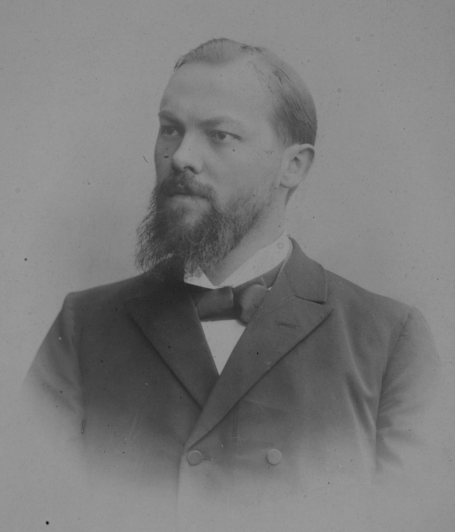 Gustav Adolf Deissmann, Theologe, 1897–1908 Professor für neutestamentliche Exegese und Kritik in Heidelberg